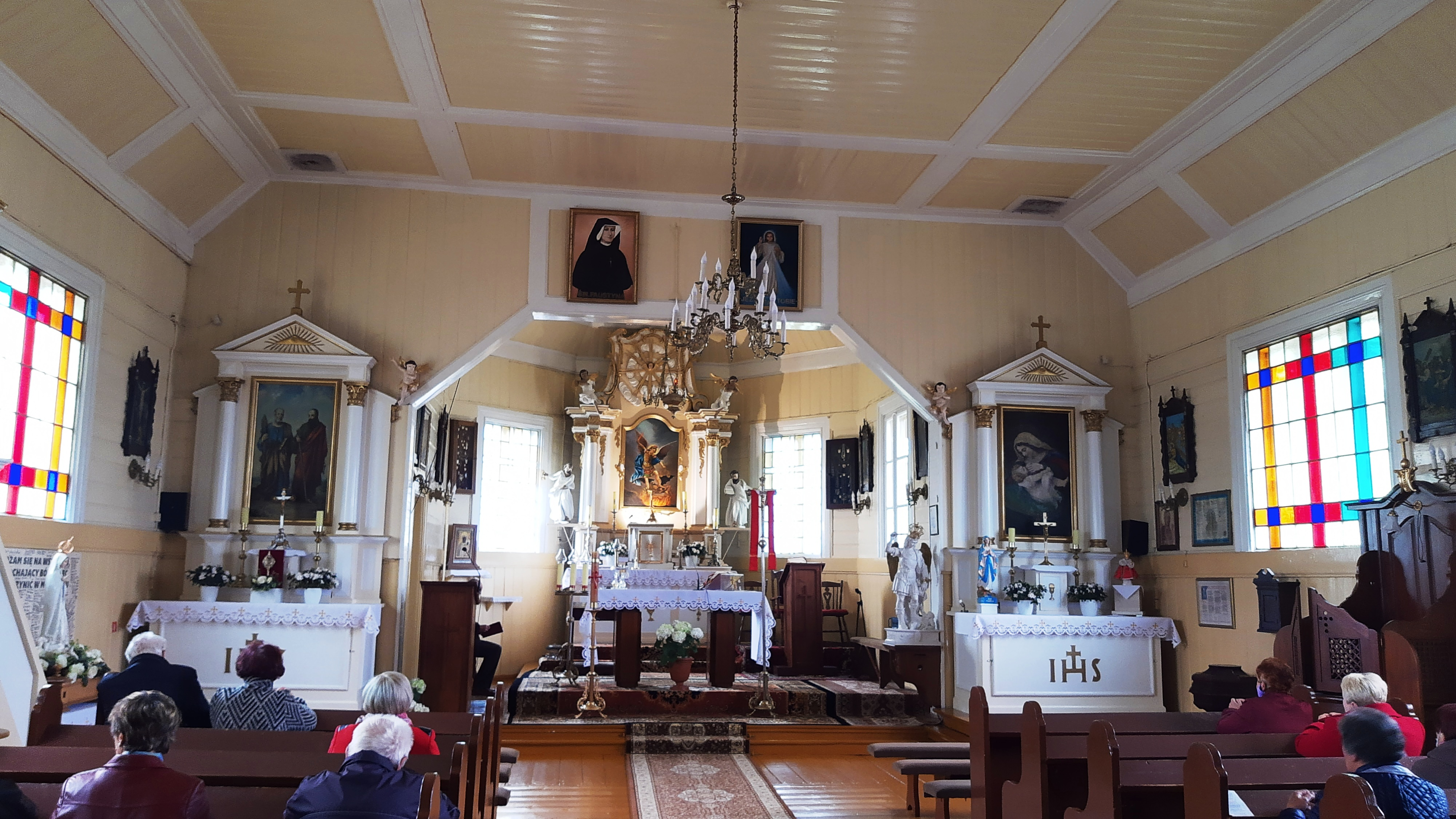 Woskrzenice Duże (gm. i pow.. Biała Podlaska - kościół (dawna cerkiew prawosławna) św. Michała Archanioła